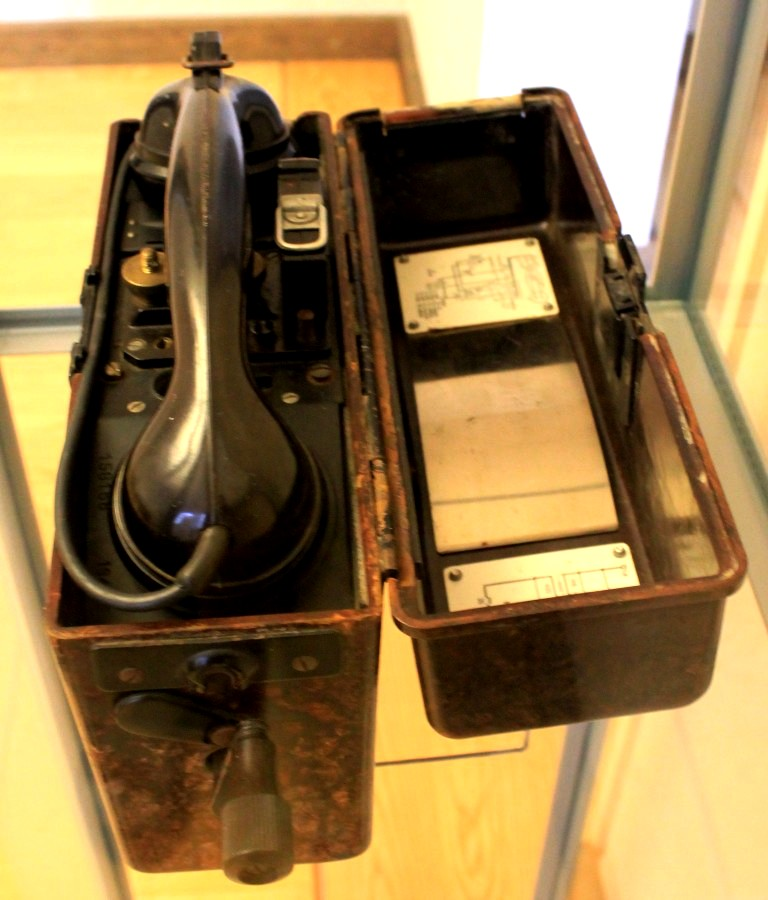 1944 wurde vom Wernerwerk die gesamte Fertigung der Feldtelefone ins Siemenslager verlegt